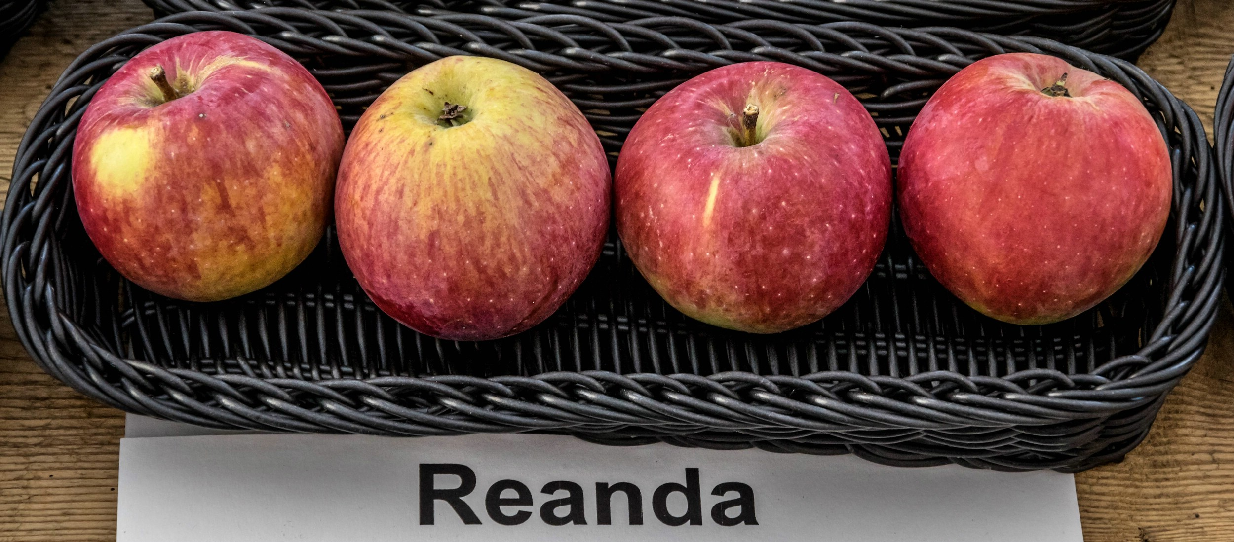 Alte Apfelsorten, von denen es im Badischen noch tragende Bäume gibt. Alle Aufnahmen au dem Oktober 2015